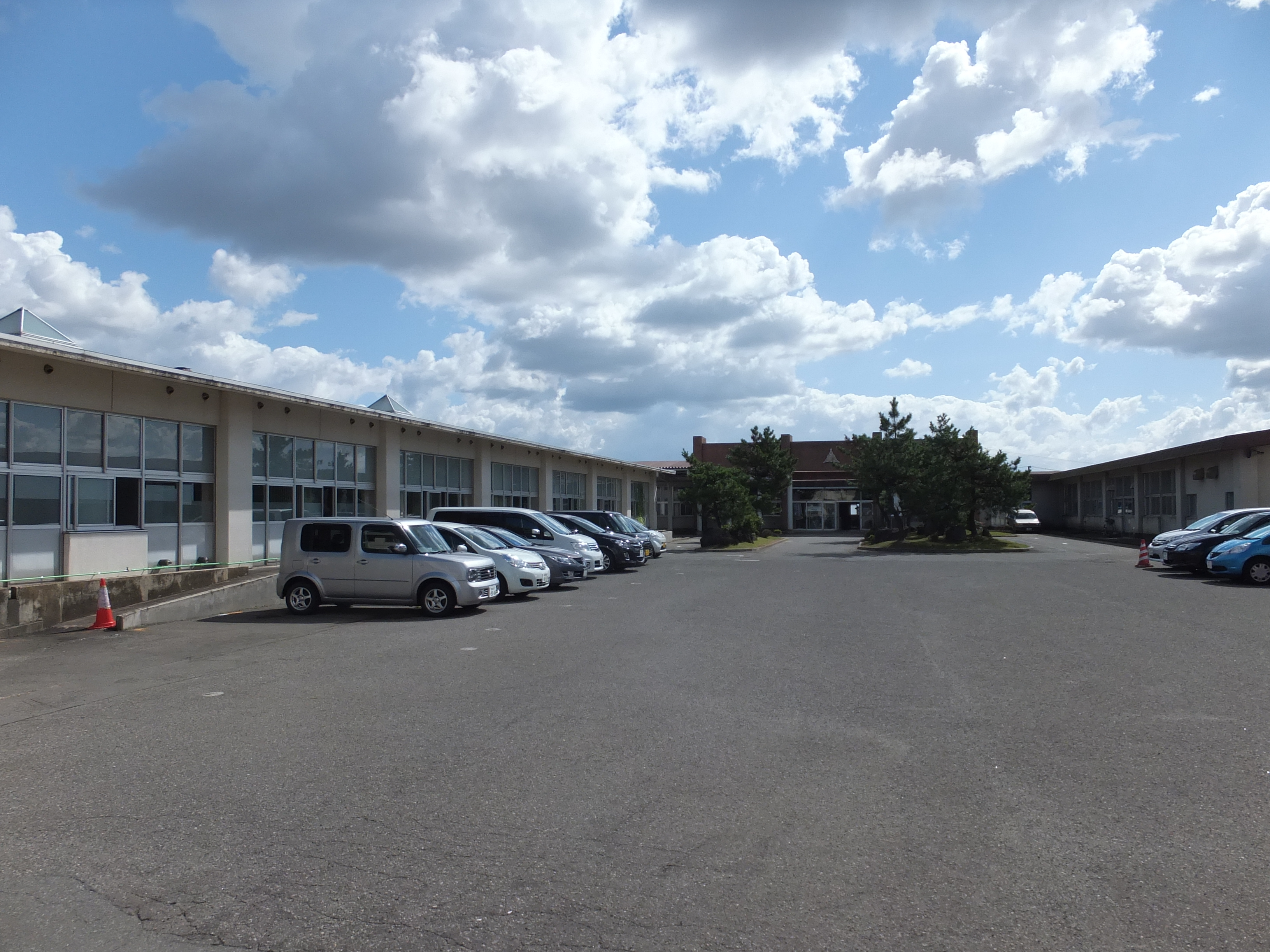 秋田県立栗田養護学校、環境・福祉課（旧秋田県立秋田養護学校の施設を使用、秋田市新屋栗田町）